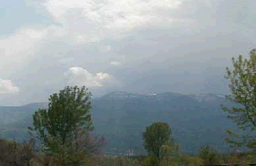 Kartepe Dağı /izmit